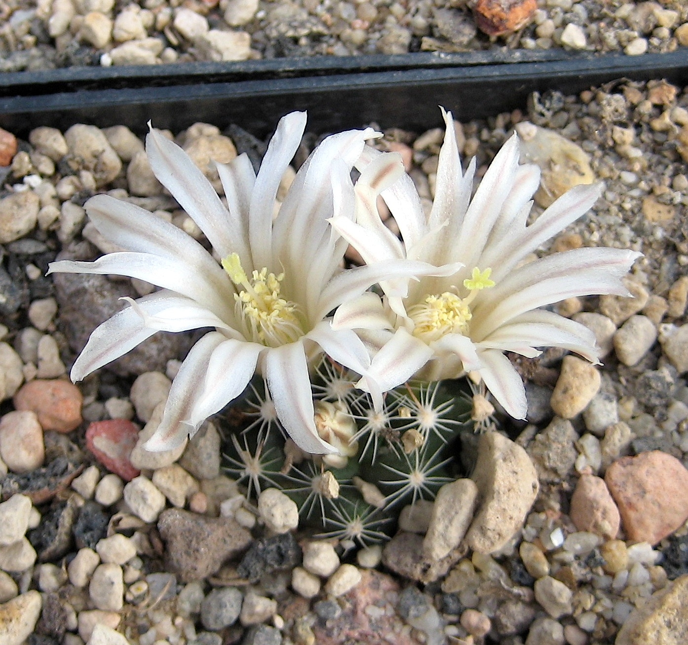 Mammillaria coahuilensis in Kultur